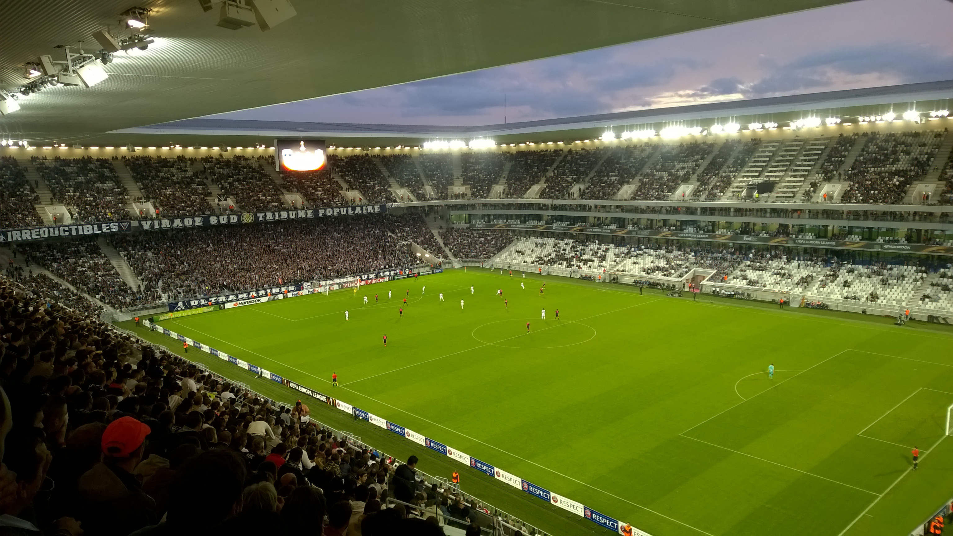 Match de football entre les Girondins de Bordeaux et le Liverpool FC comptant pour la Ligue Europa au stade MATMUT Atlantique le 17 septembre 2015.